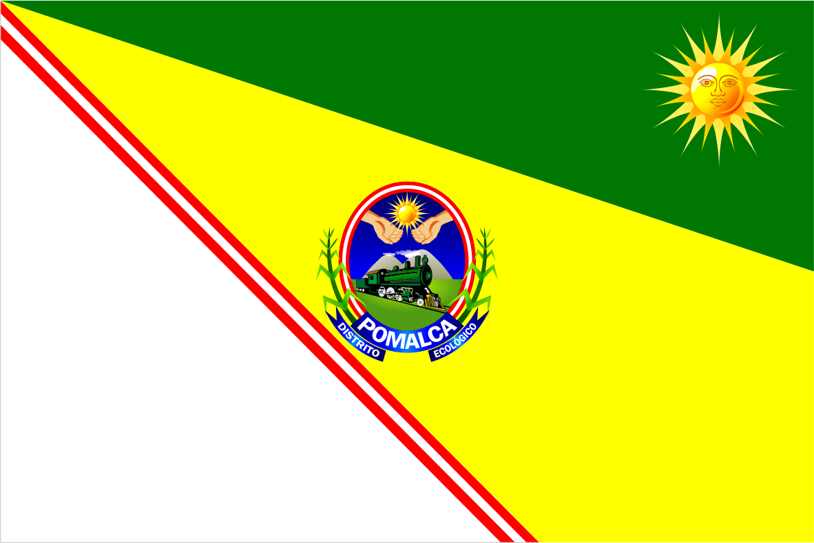 Distrito de Pomalca - Provincia de Chiclayo - Región Lambayeque